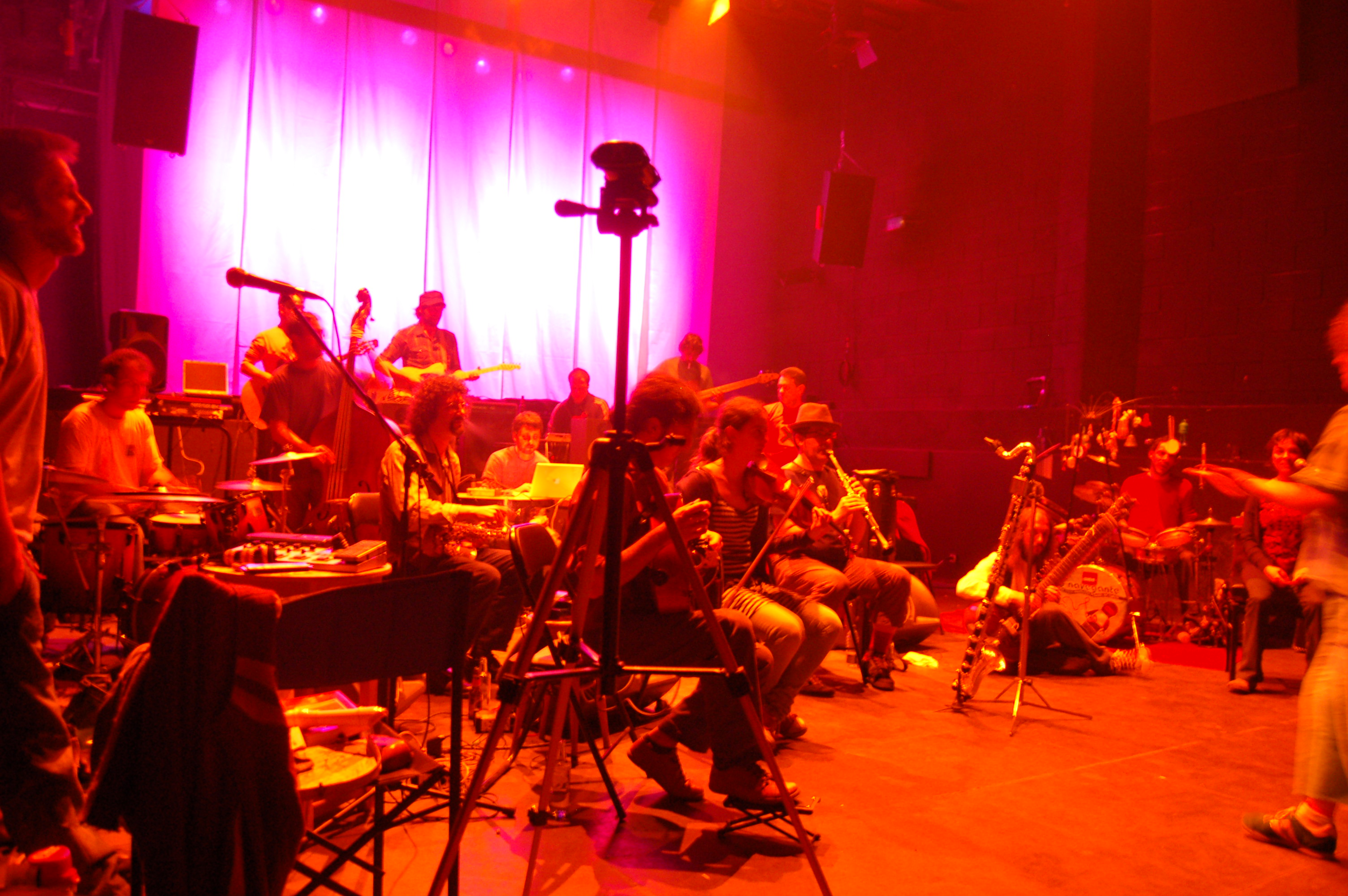 Orquestra de Música Espontánea de Galicia en concerto na sala Nasa de Santiago de Compostela